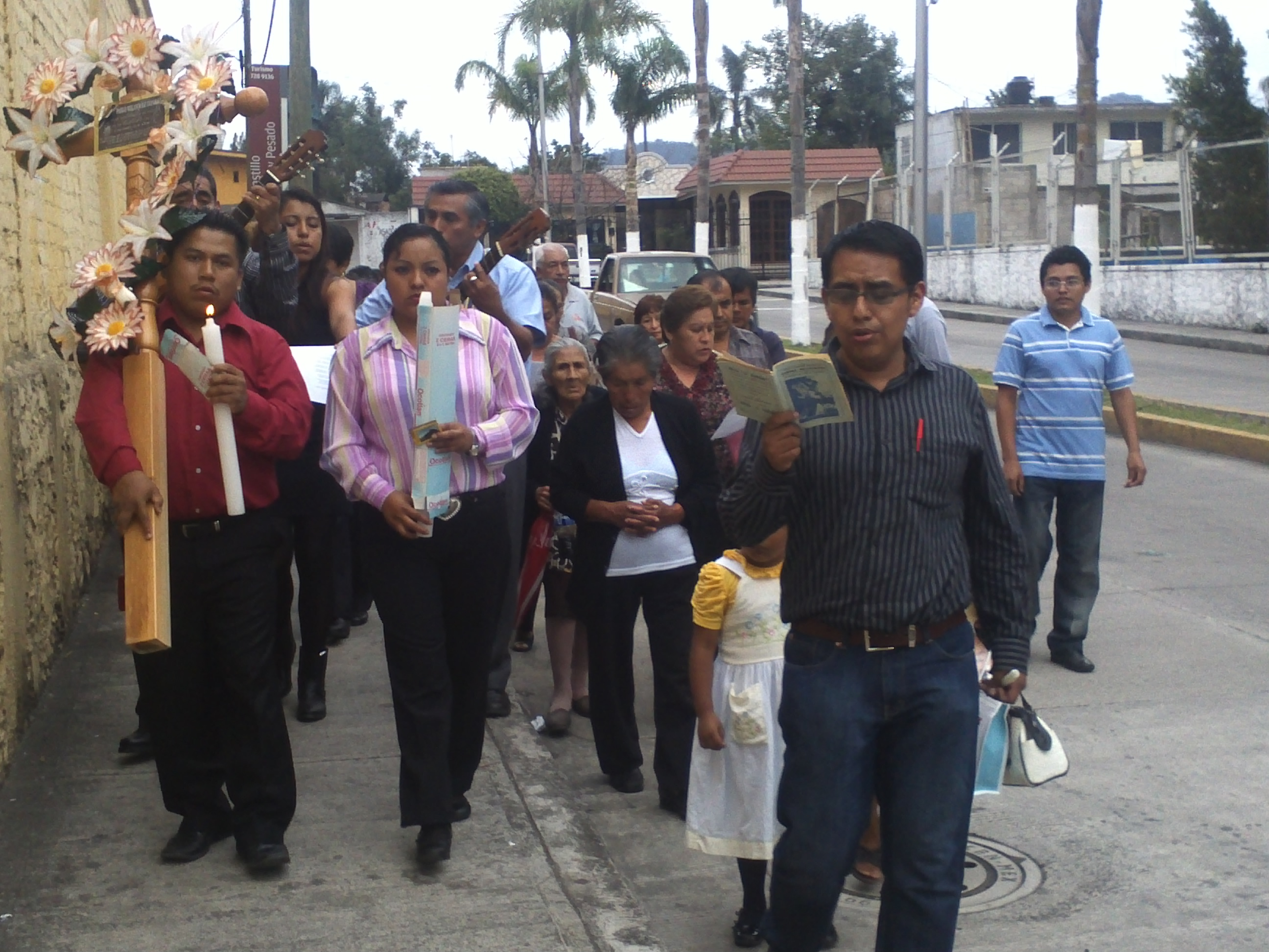 A los 9 días se acostumbra la tradición de la levantada de cruz de difunto en Orizaba, Ver.